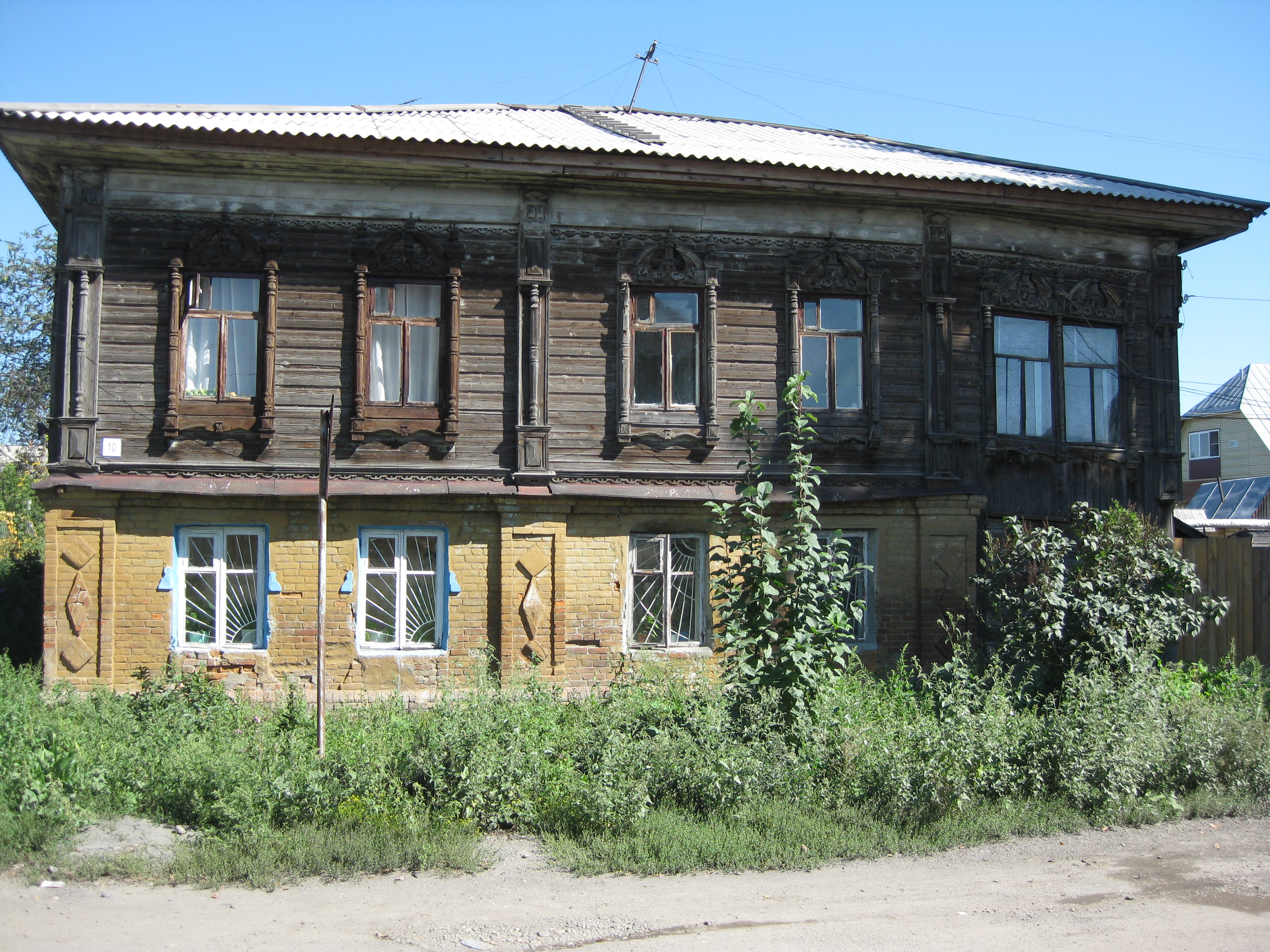 дом жилой